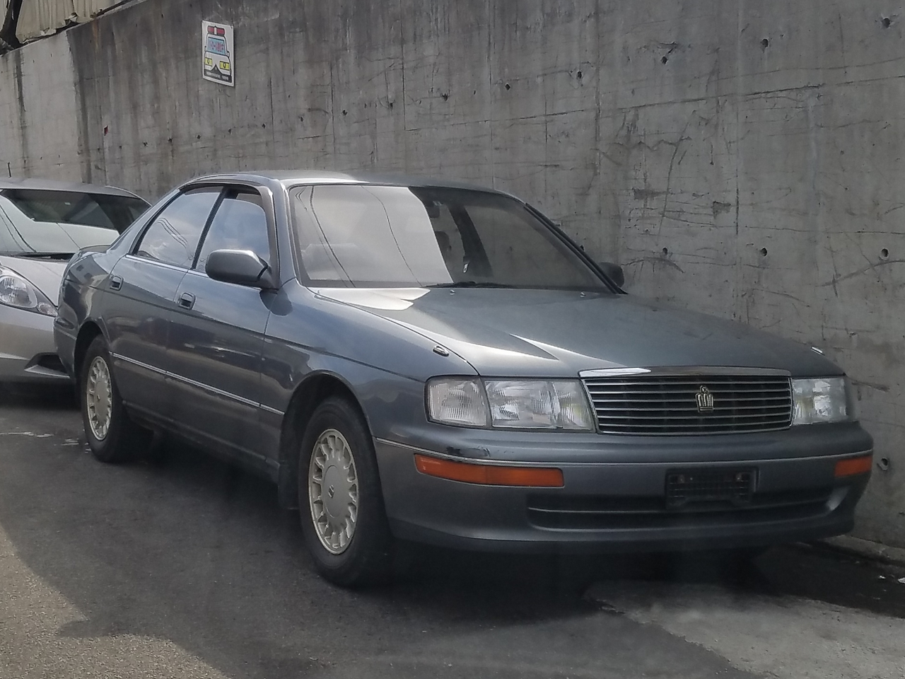 クラウン ハードトップ ロイヤルサルーン（前期型）